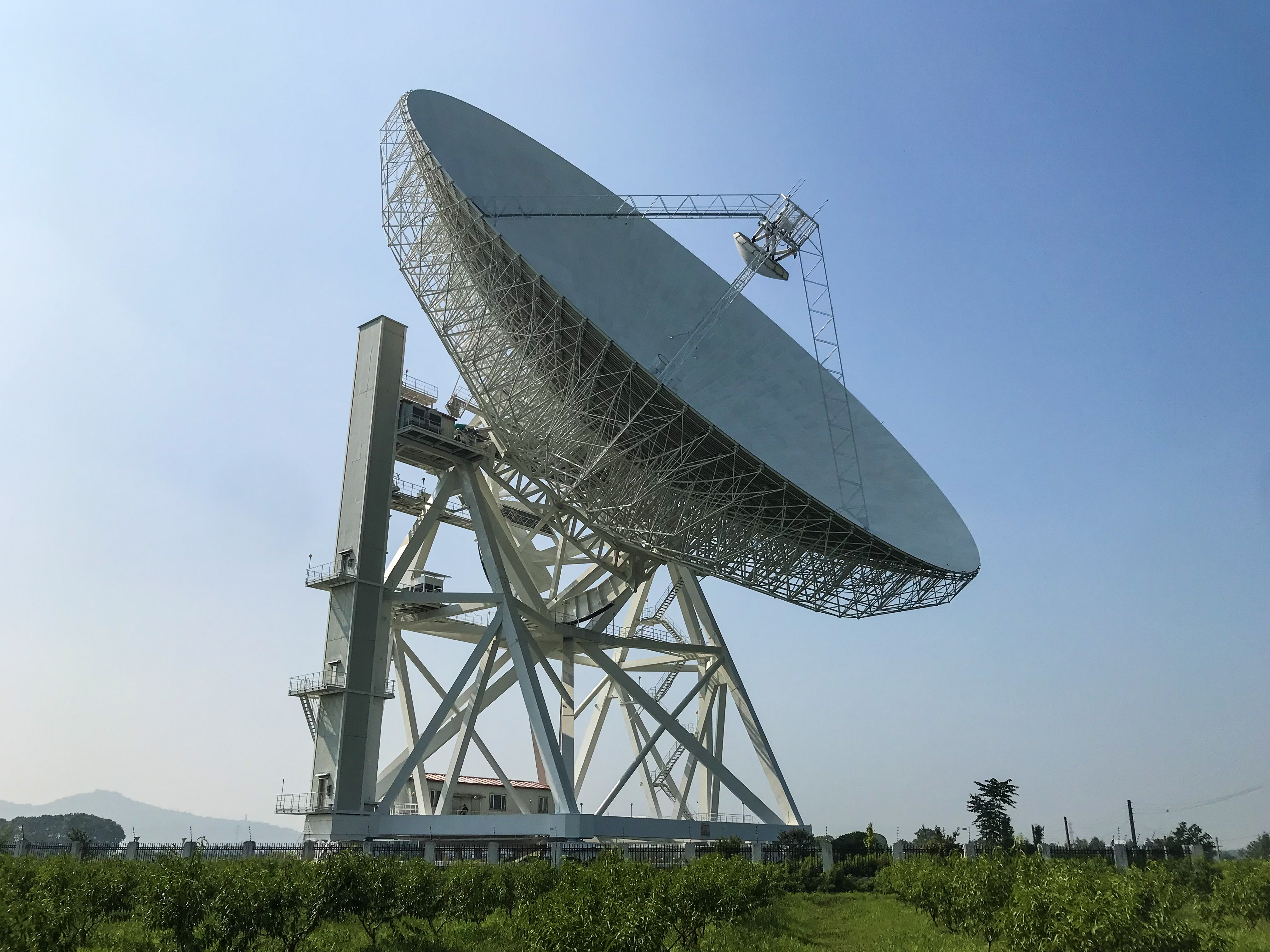 中文（中国大陆）: 天马射电望远镜